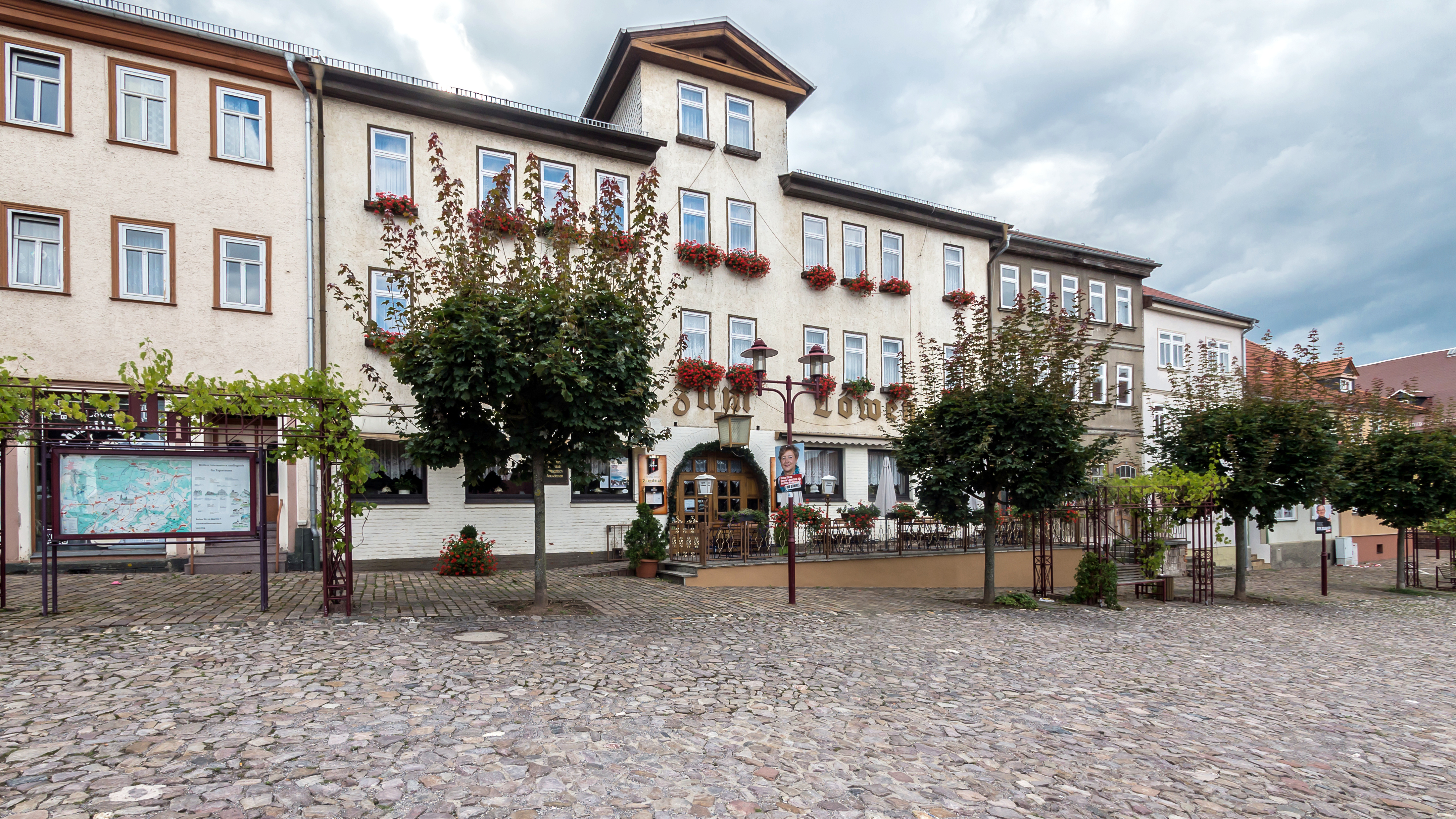 Königsee Markt